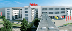 Printus Gebäude